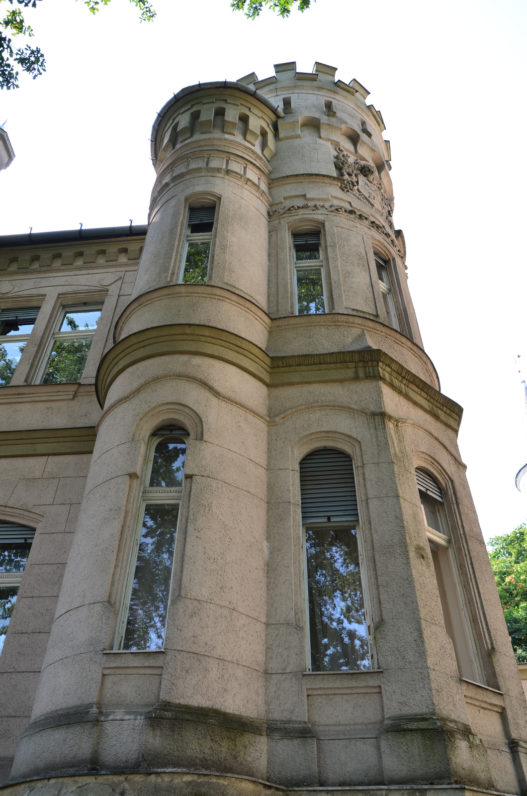 Sacelláry-kastély (Budapest 22, Anna u. 1-3.) This is a photo of a monument in Hungary. Identifier: 16316